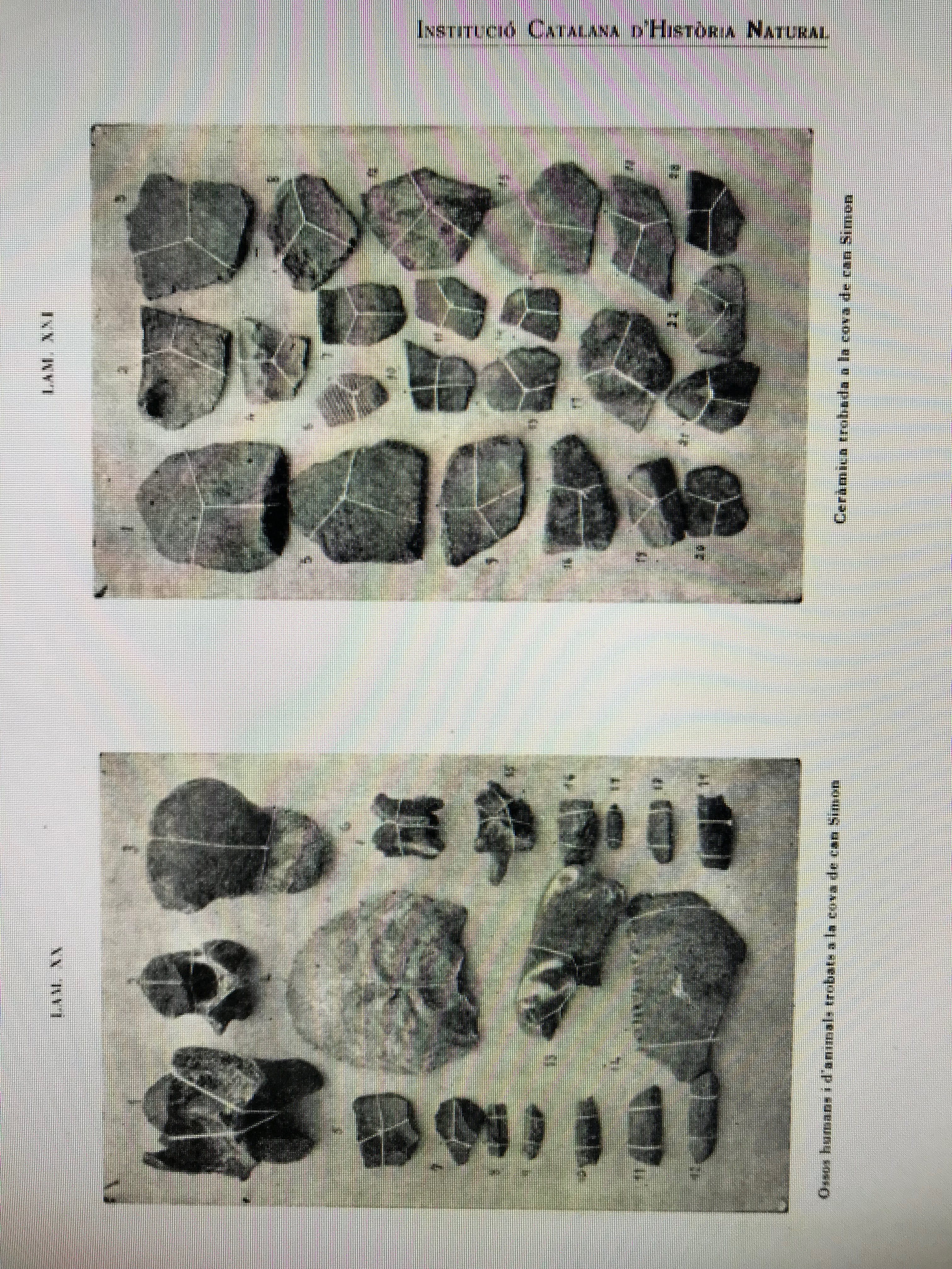 Ceràmiques i ossos